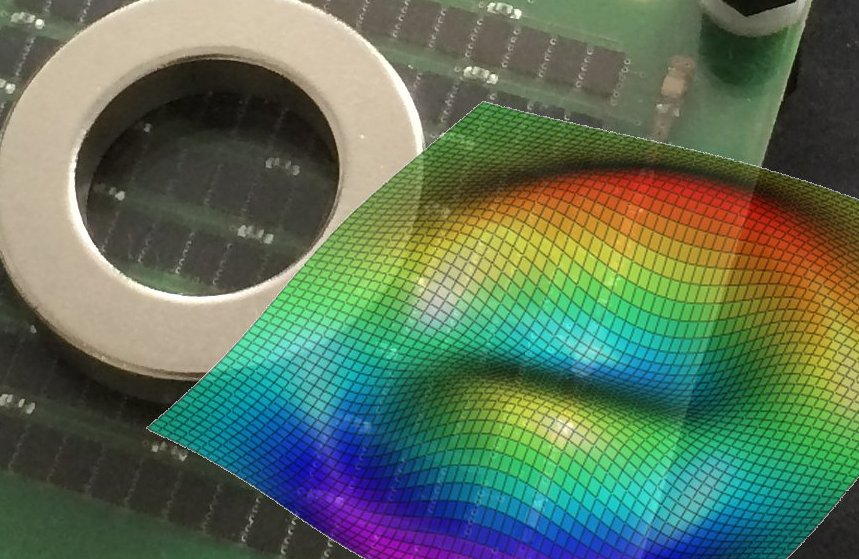 Magnetische Kamera mit gemessenem By